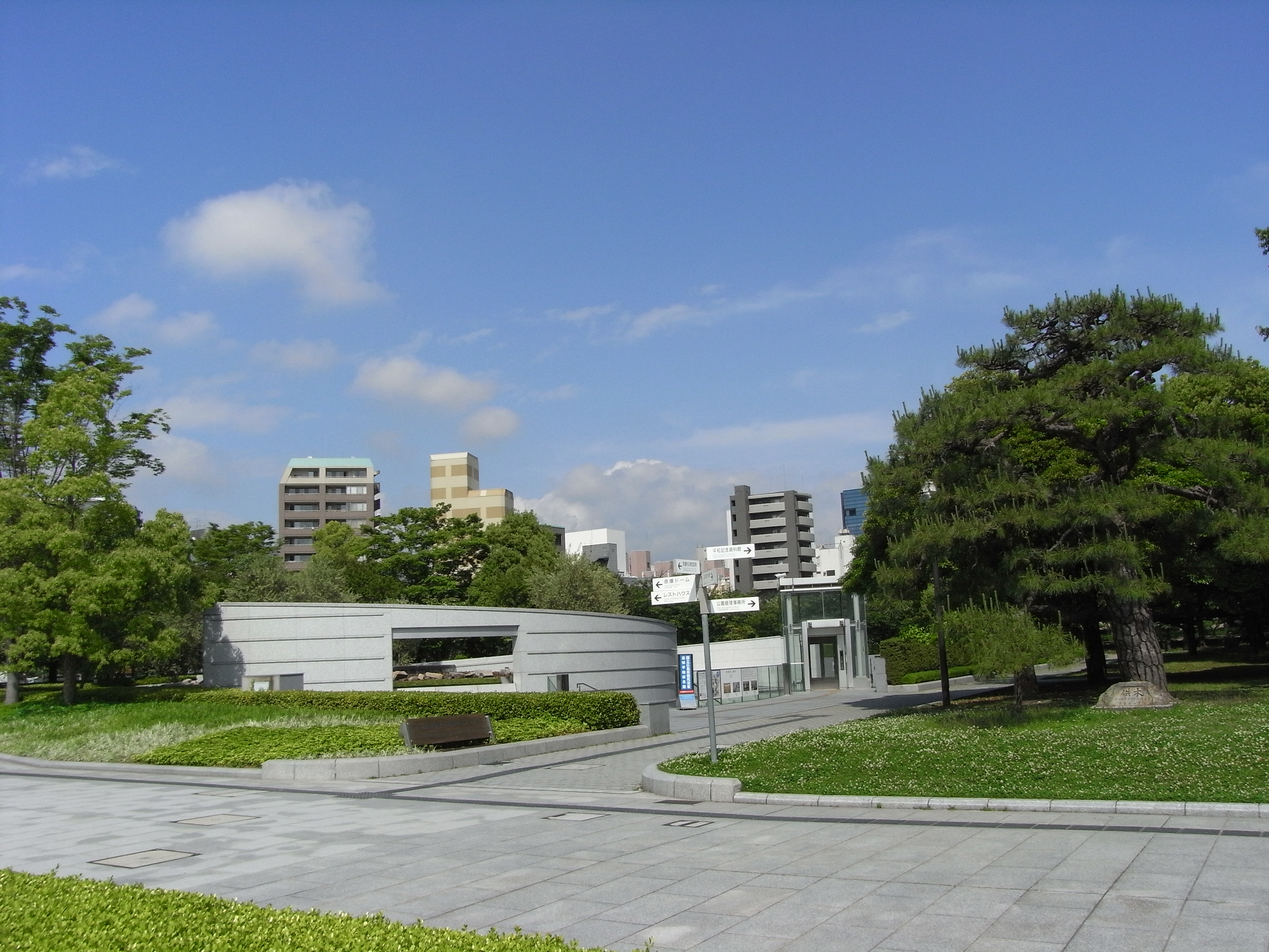 Hiroshima Peace Memorial Museum(国立広島原爆死没者追悼平和祈念館)